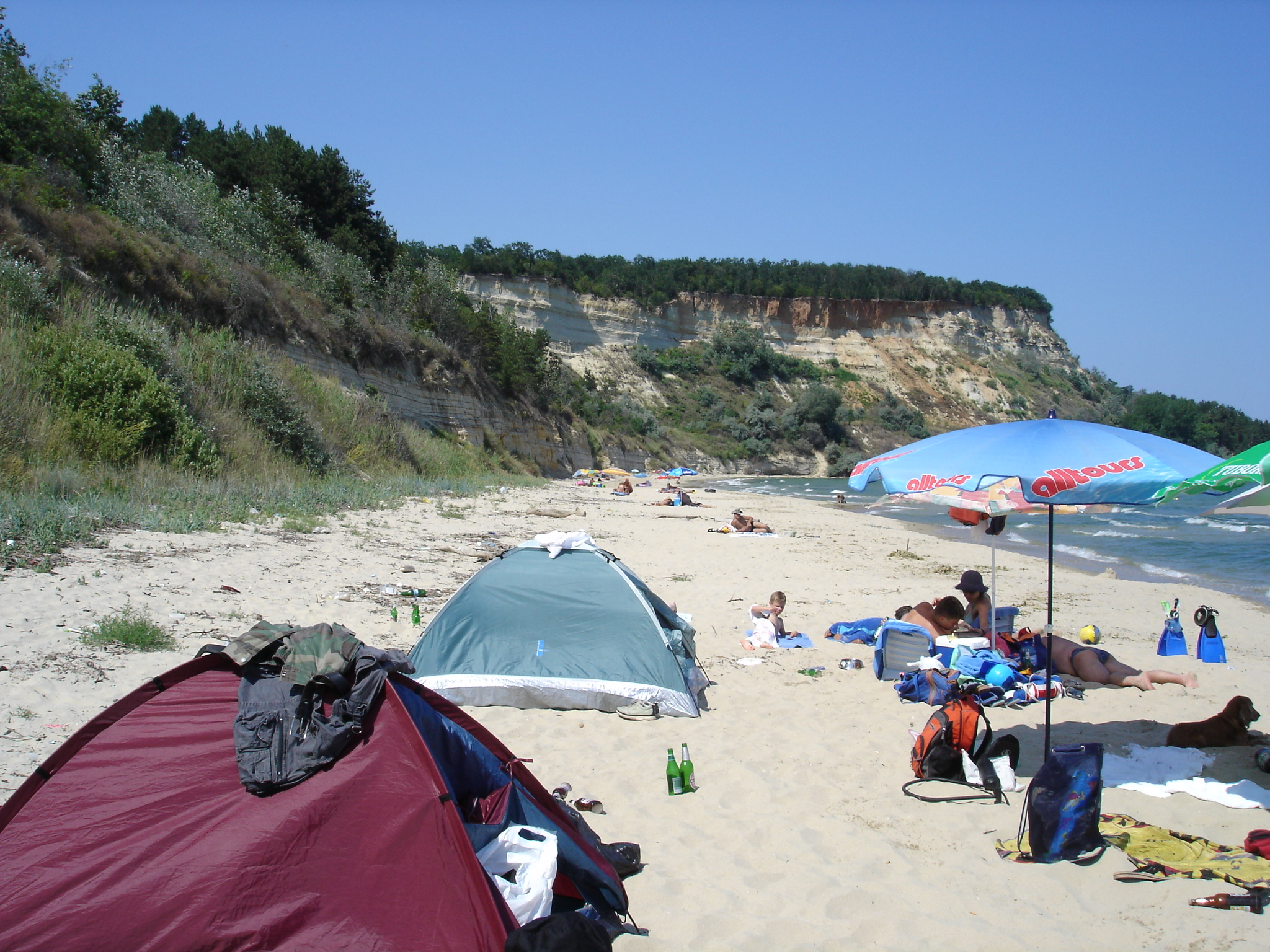 Camping Romantika near Kamchia river, Bulgaria